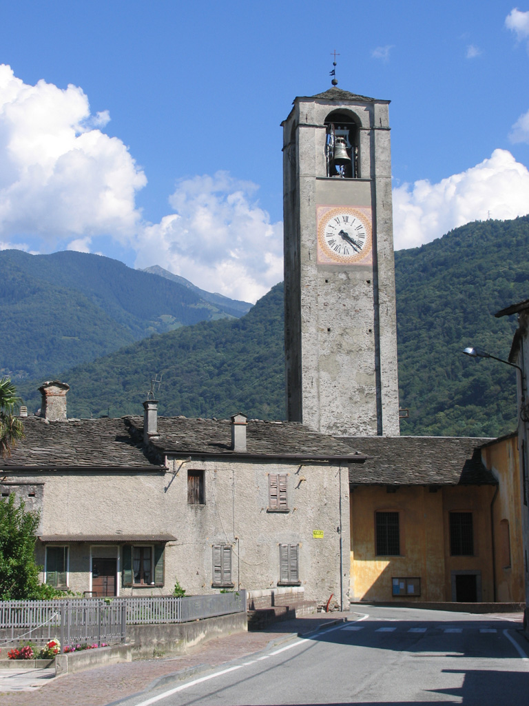 Cosio 08/2008